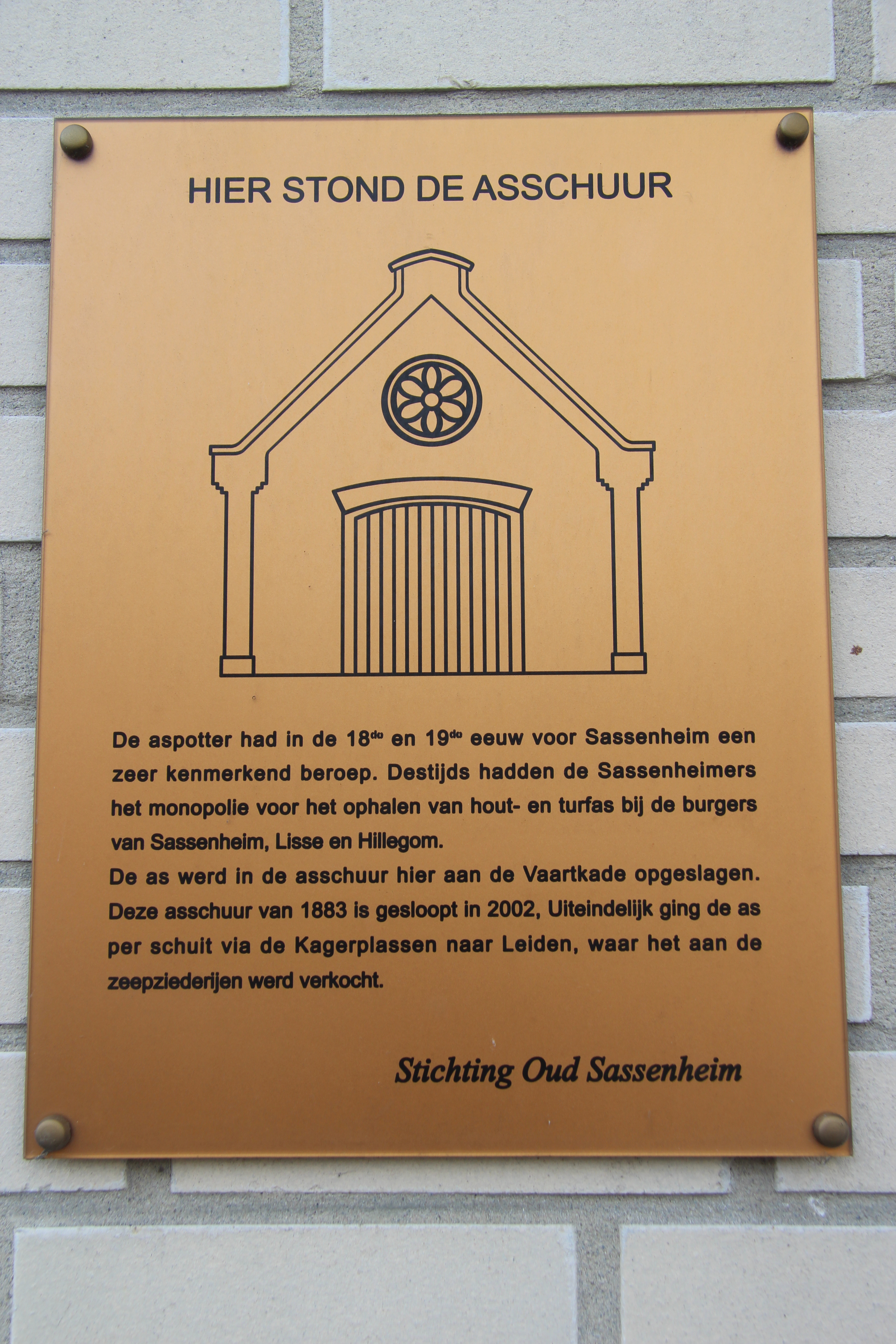 Plaquette geplaatst door de Stichting Oud Sassenheim op een flatgebouw aan de Vaartkade in Sassenheim ter herinnering aan de zogenoemde 'Asschuur', die er heeft gestaan van circa 1880 tot de sloop in 2002. De schuur werd gebruikt door 'aschhaalder' of 'aschpotter'.